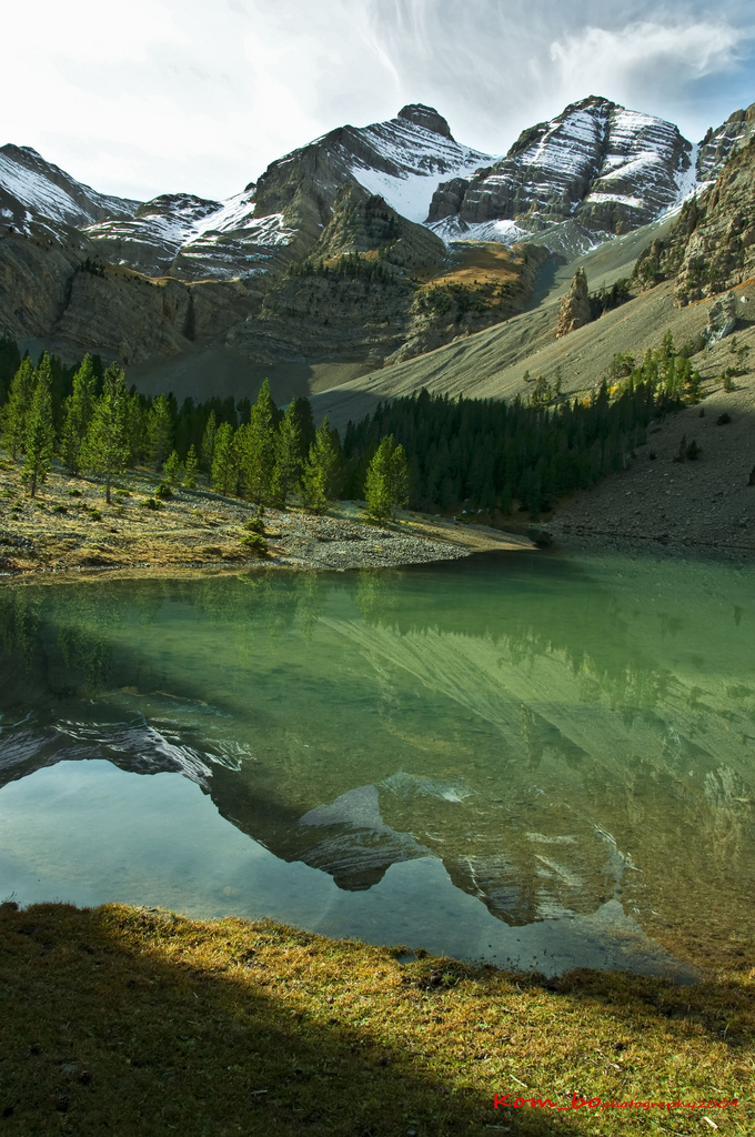 Reflejos en la Basa de La Mora _ 2